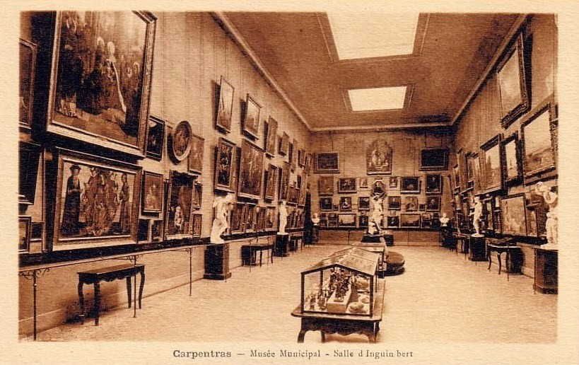 Salle Inguimbert du musée-bibliothèque de Carpentras